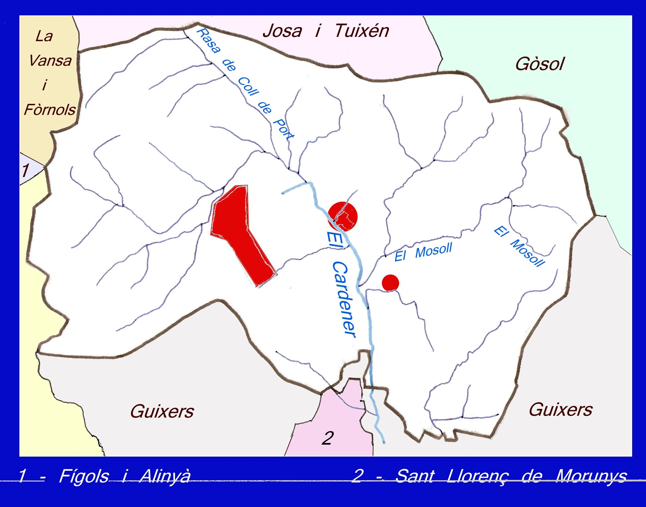 Mapa del municipi de la Coma i la Pedra (Solsonès). Hidrografia